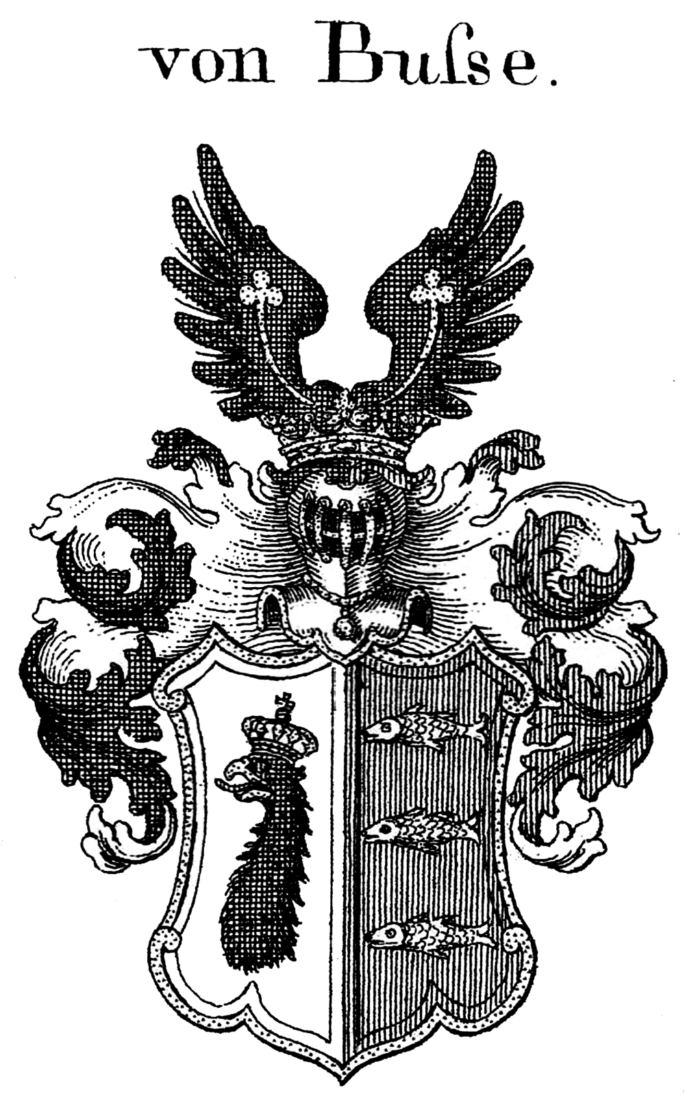 Wappen der Familie von Busse mit gekröntem Adlerkopf und drei Fischen